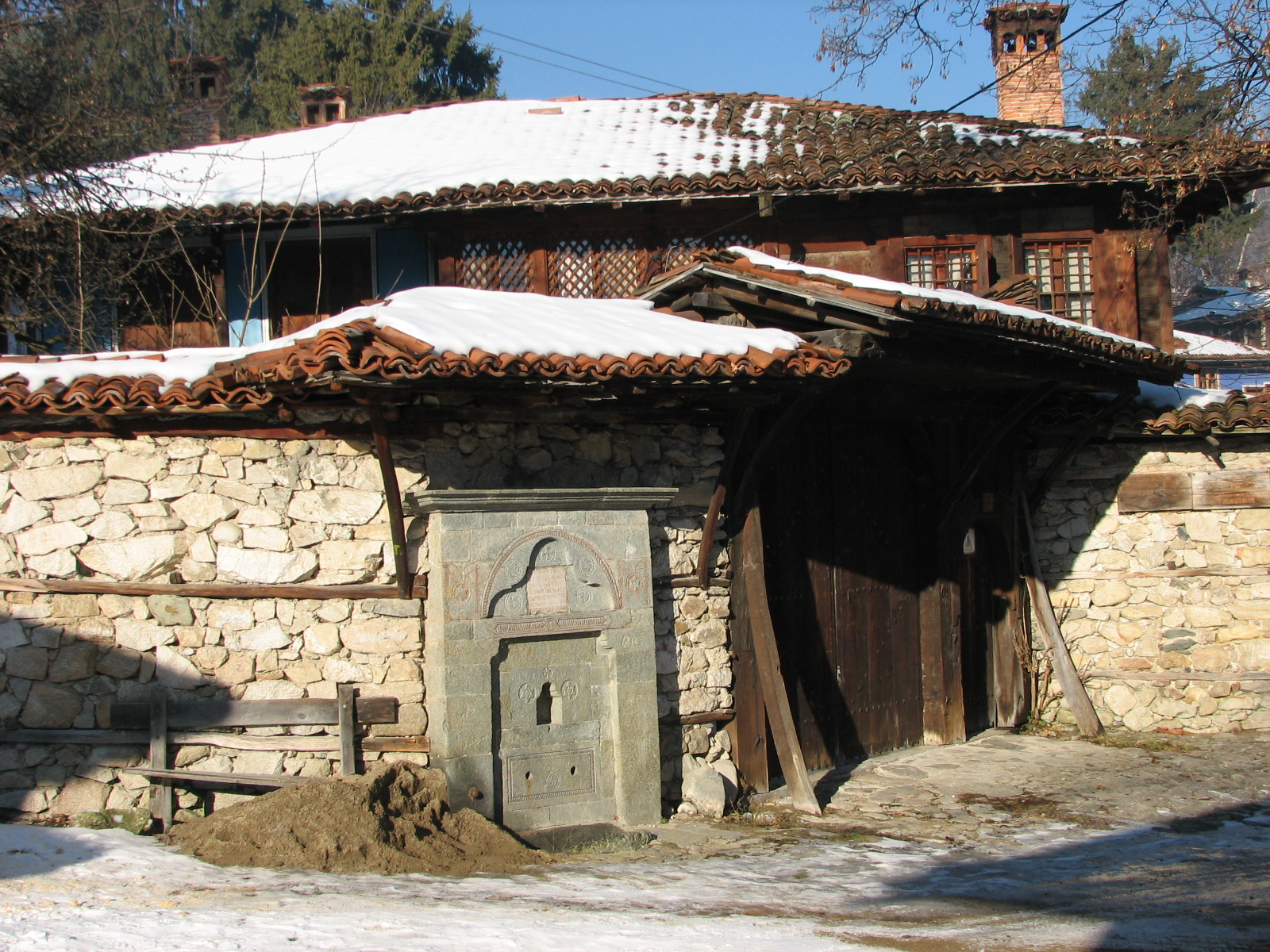 Родната къща на Евлампия Векилова